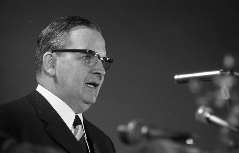 Landesparteitag der CDU in Bochum (Parkhaus)